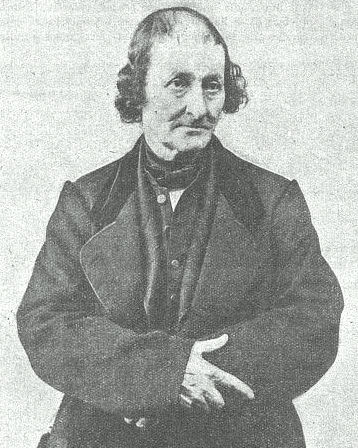 Dr Roulin en 1865.